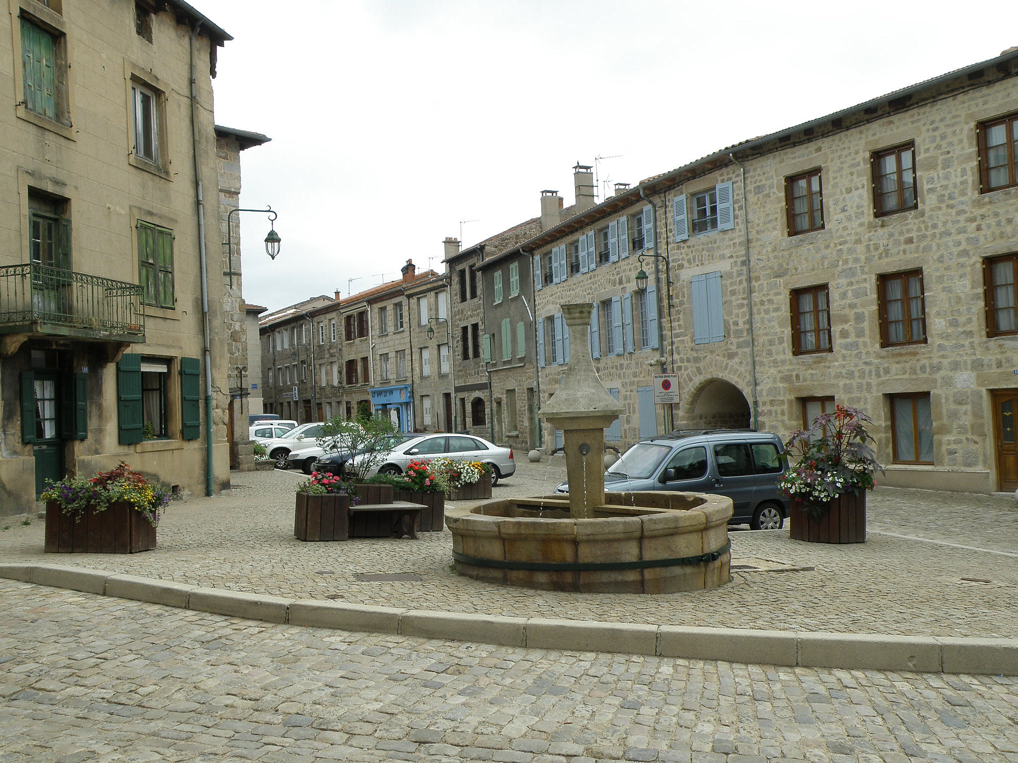 Saint-Didier-en-Velay, comm. de la Haute-Loire, France, Auvergne. Grand'Place.